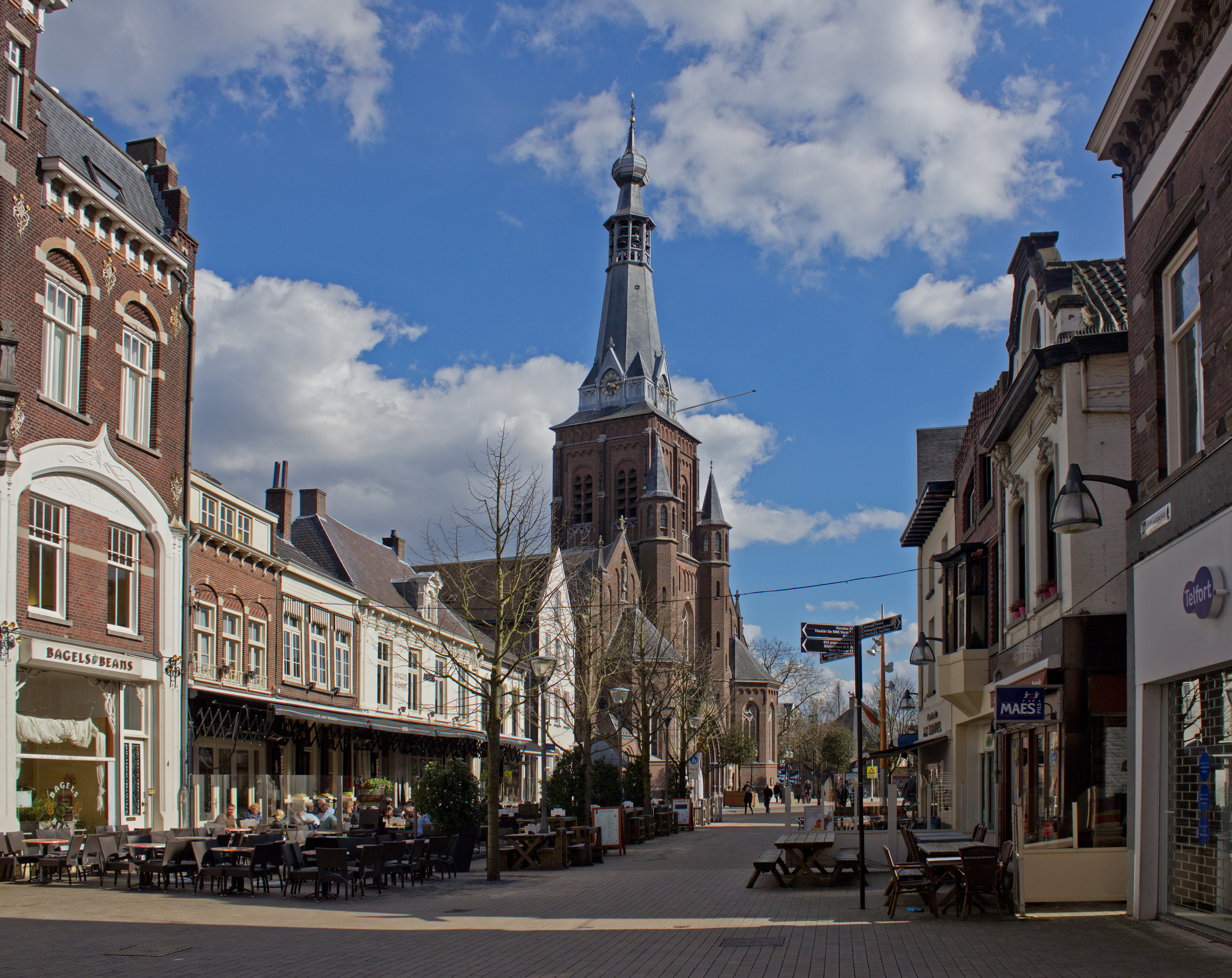 Tilburg, toren Heikese kerk